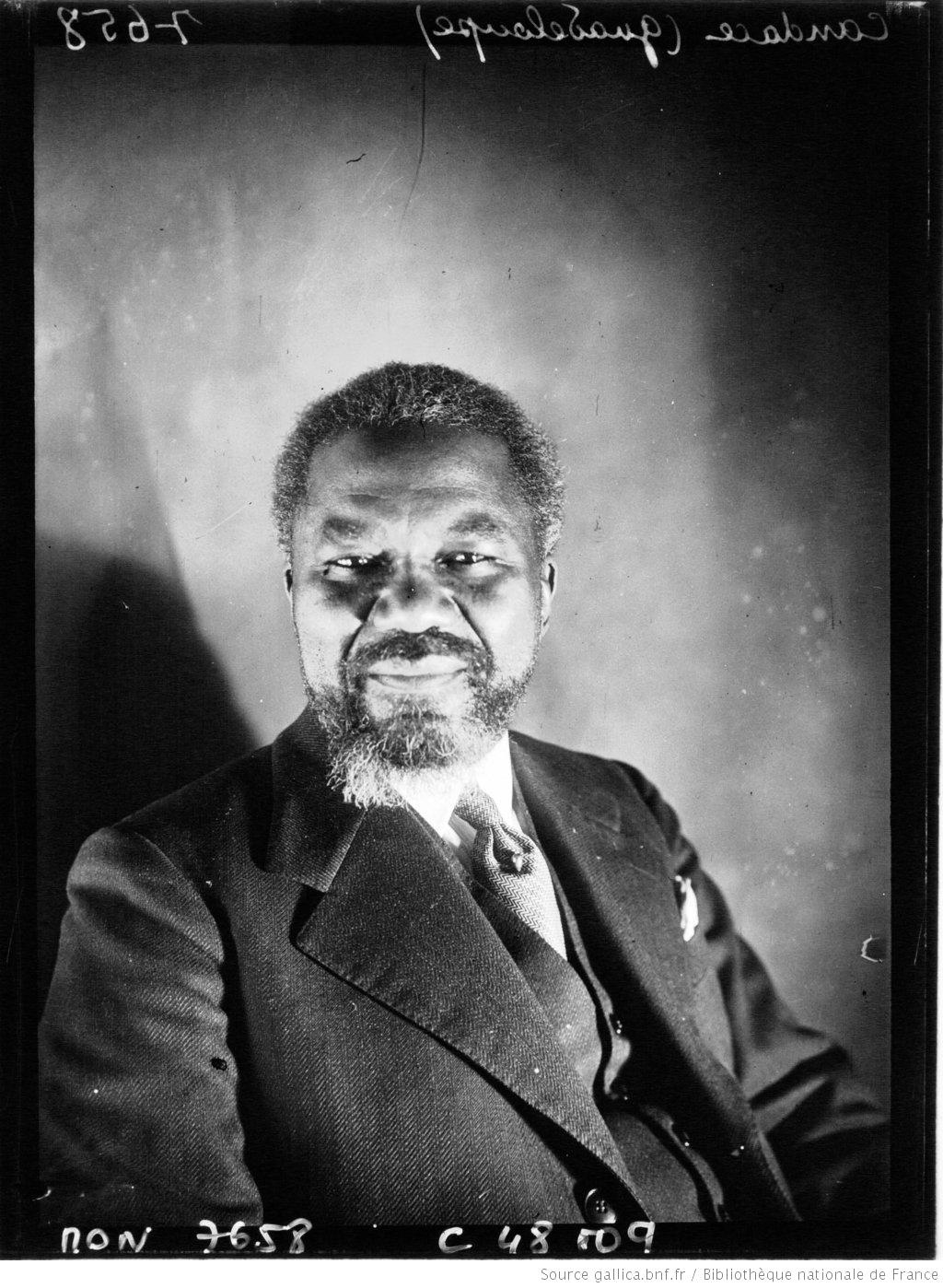 Agence de presse Mondial Photo-Presse.- Portrait de M. Candace, député de la Guadeloupe, Diffusée par l'Agence Mondial, Paris, 1933.